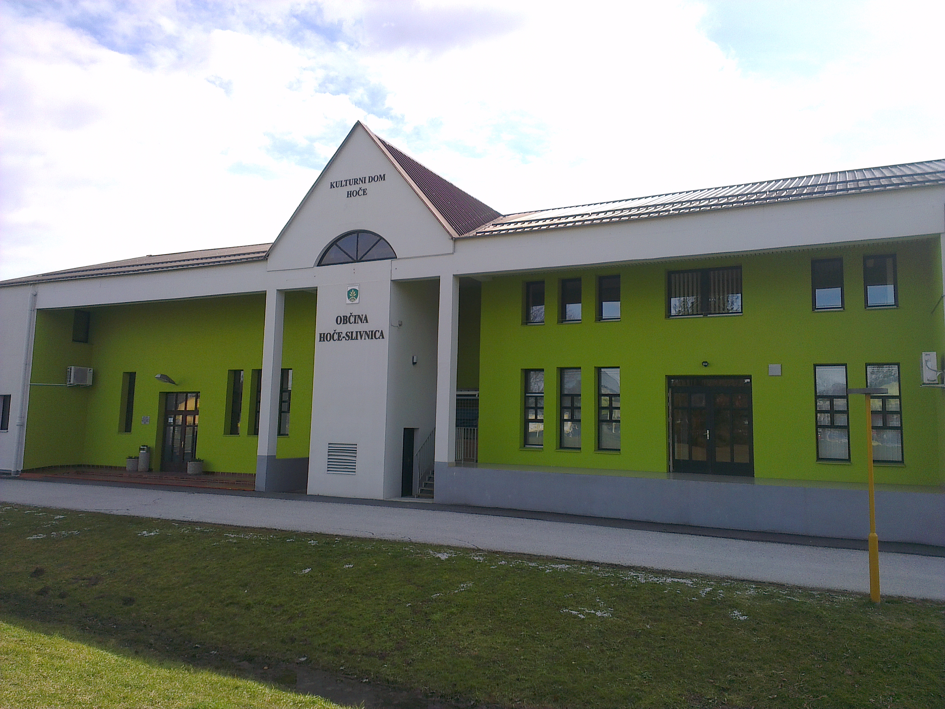 Kulturni dom in obcina Hoce